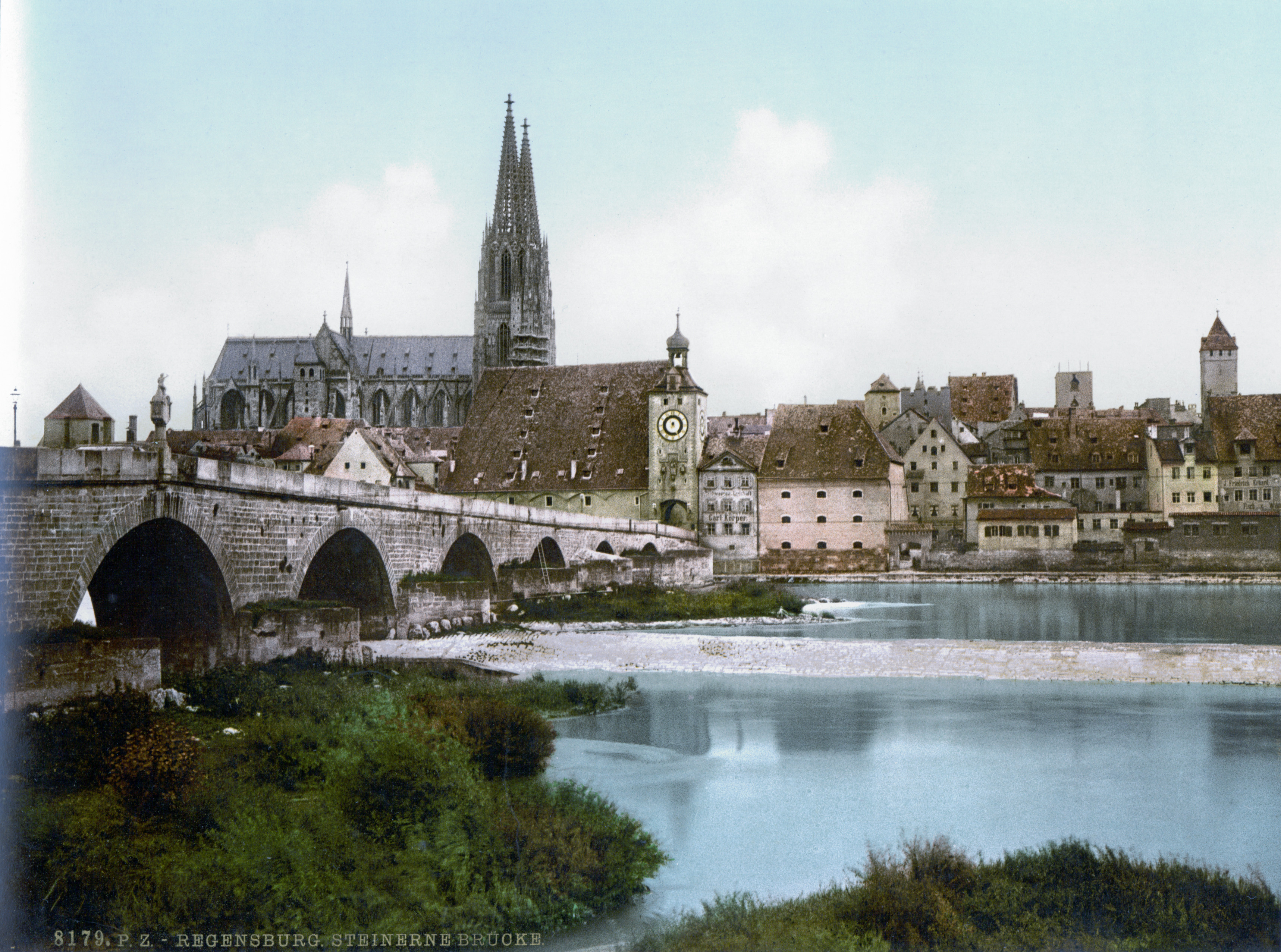 Steinerne Bruecke Regensburg um 1900